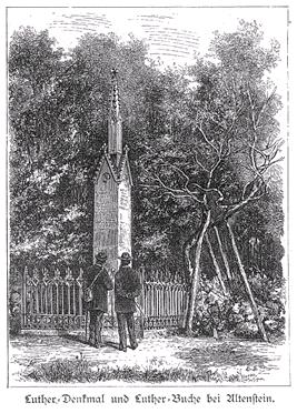 Historische Darstellung des Lutherdenkmals bei Steinbach, Illustrirte Zeitung, 1883.